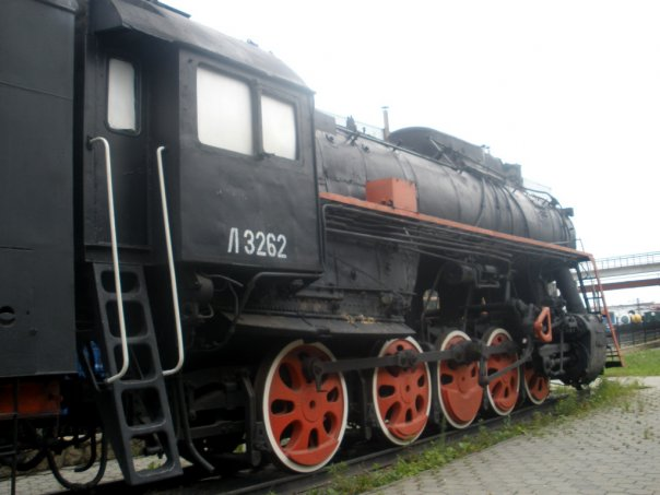 музейный Л-3262 в Екатеринбургском железнодорожном музее